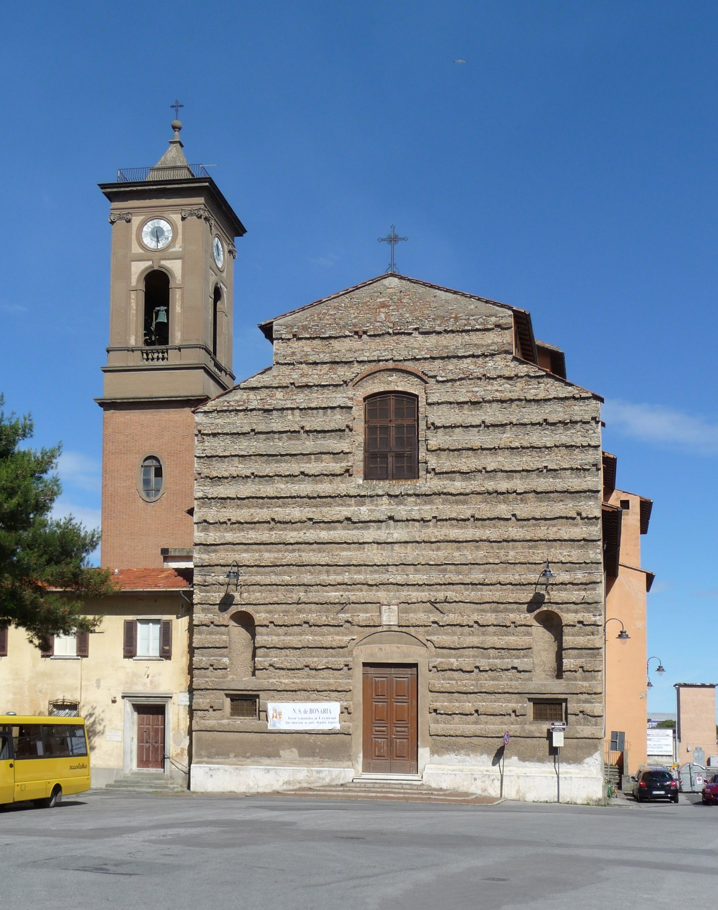 Chiesa di San Ferdinando, Livorno